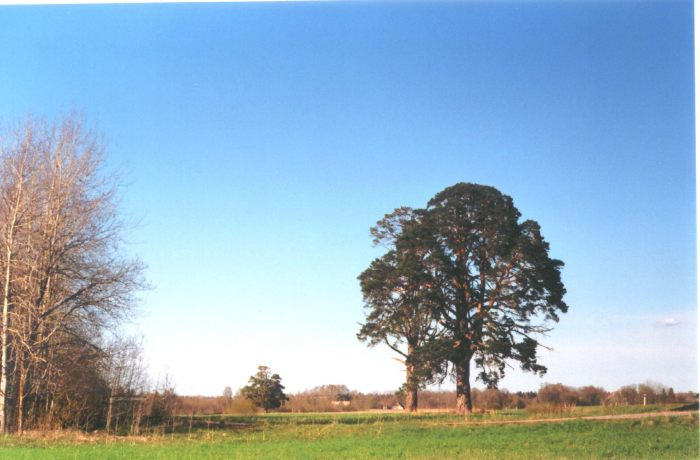 Ojasoo männid